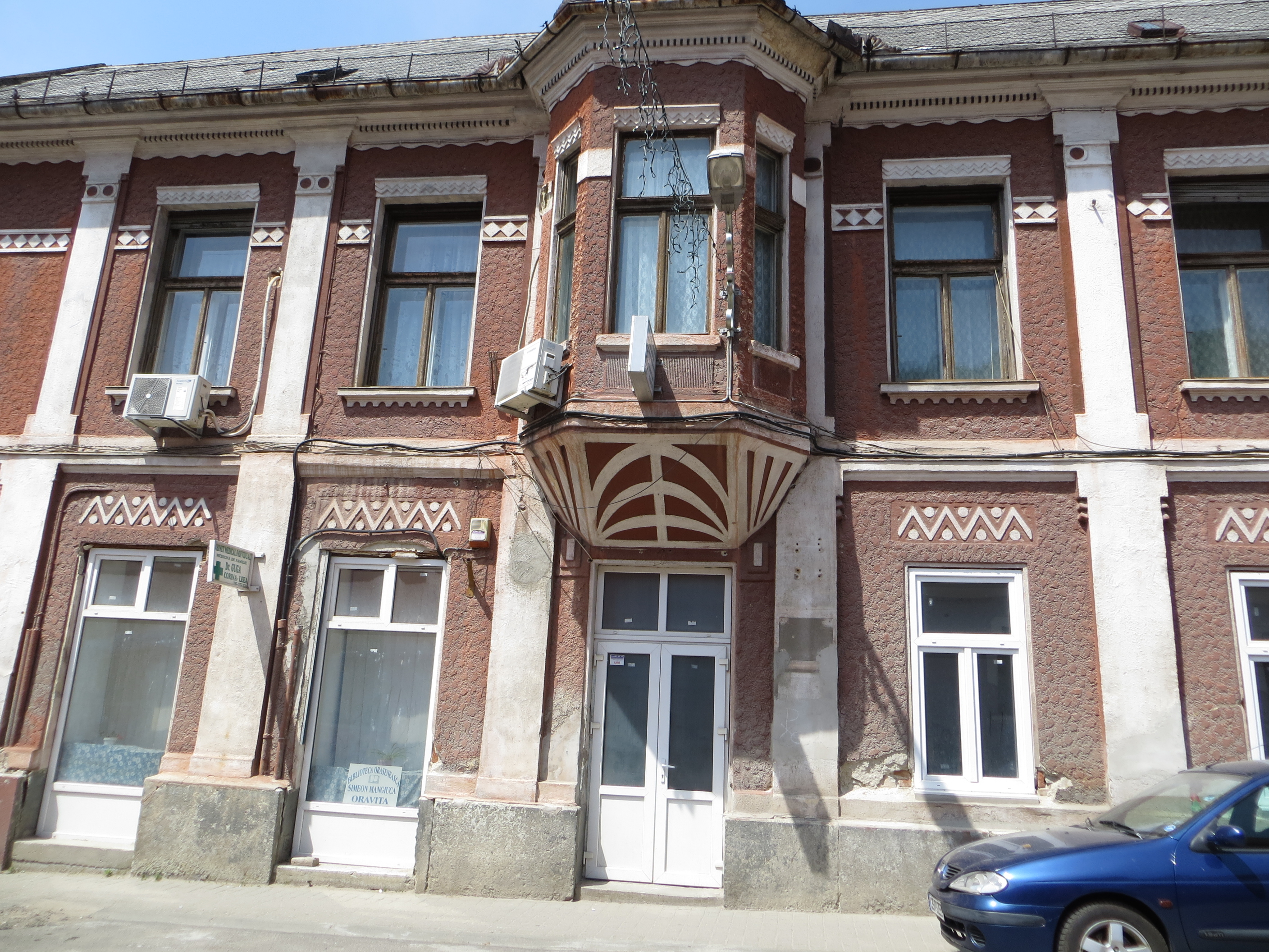 Casa Avocaților, azi Biblioteca orășenească "Simeon Mangiuca", cabinete medicale și locuințe